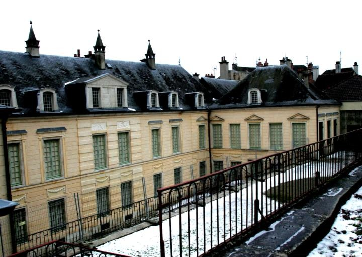 Hôtel de Buffon, Montbard (Côte d'Or)- vue du Petit Fontenet, au premier plan l'ancien Parterre du Dôme